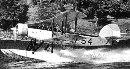 Argentinisches Fairey Seal-Schwimmerflugzeug